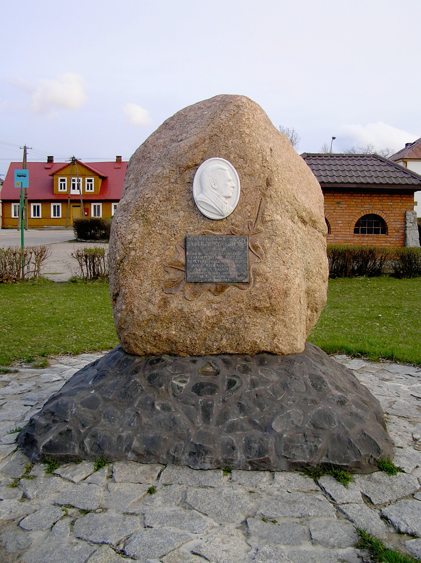 Pomnik poświęcony pamięci Wojciecha Jastrzębowskiego, w Broku